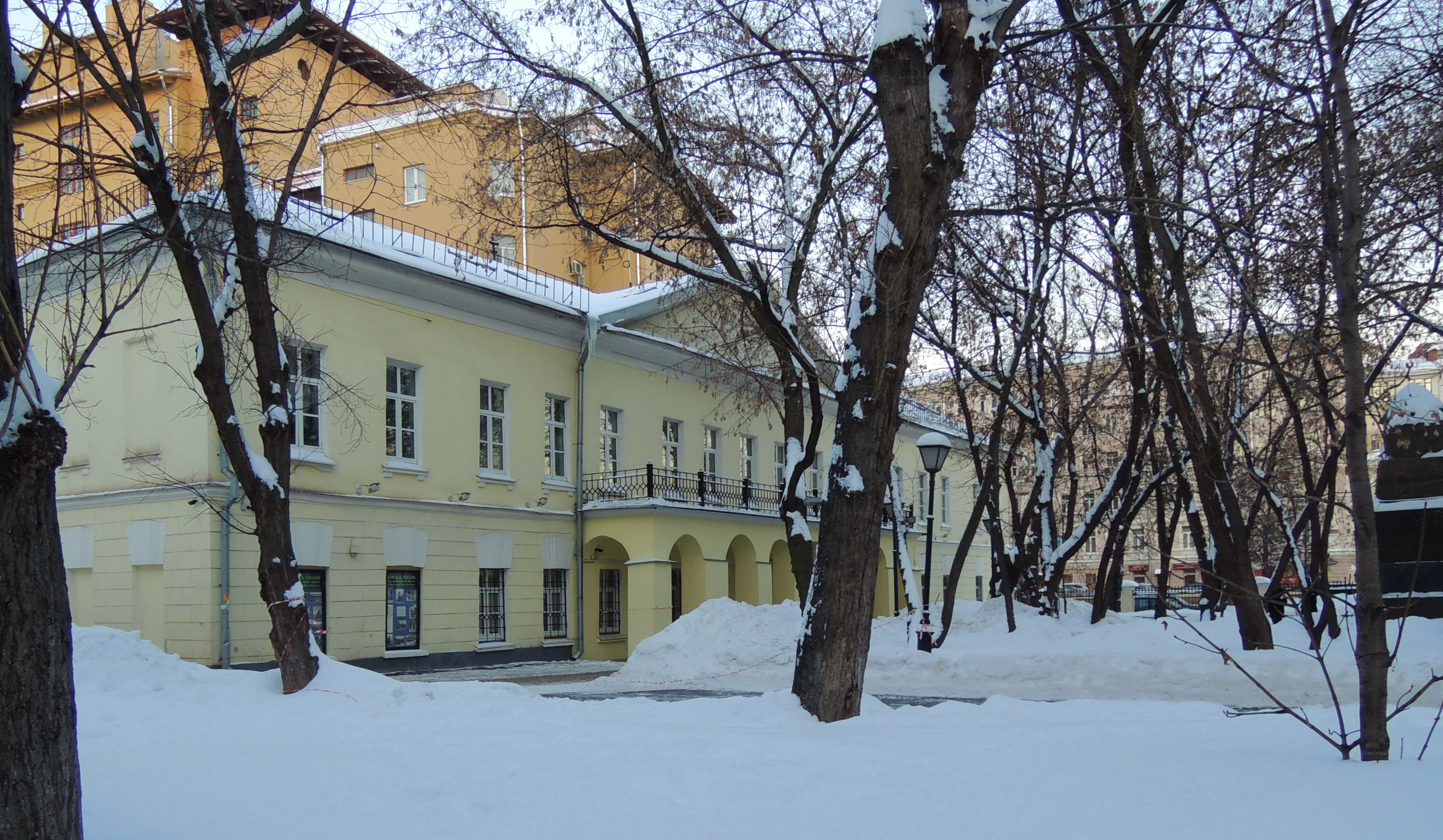 Никитский бульвар. № 7А — усадьба графа Александра Толстого. Здесь провёл последние годы своей жизни и умер Николай Васильевич Гоголь. В 1959 году во дворе дома был установлен памятник писателю работы скульптора Николая Андреев). Флигели усадьбы и памятник Гоголю являются объектами культурного наследия федерального значения